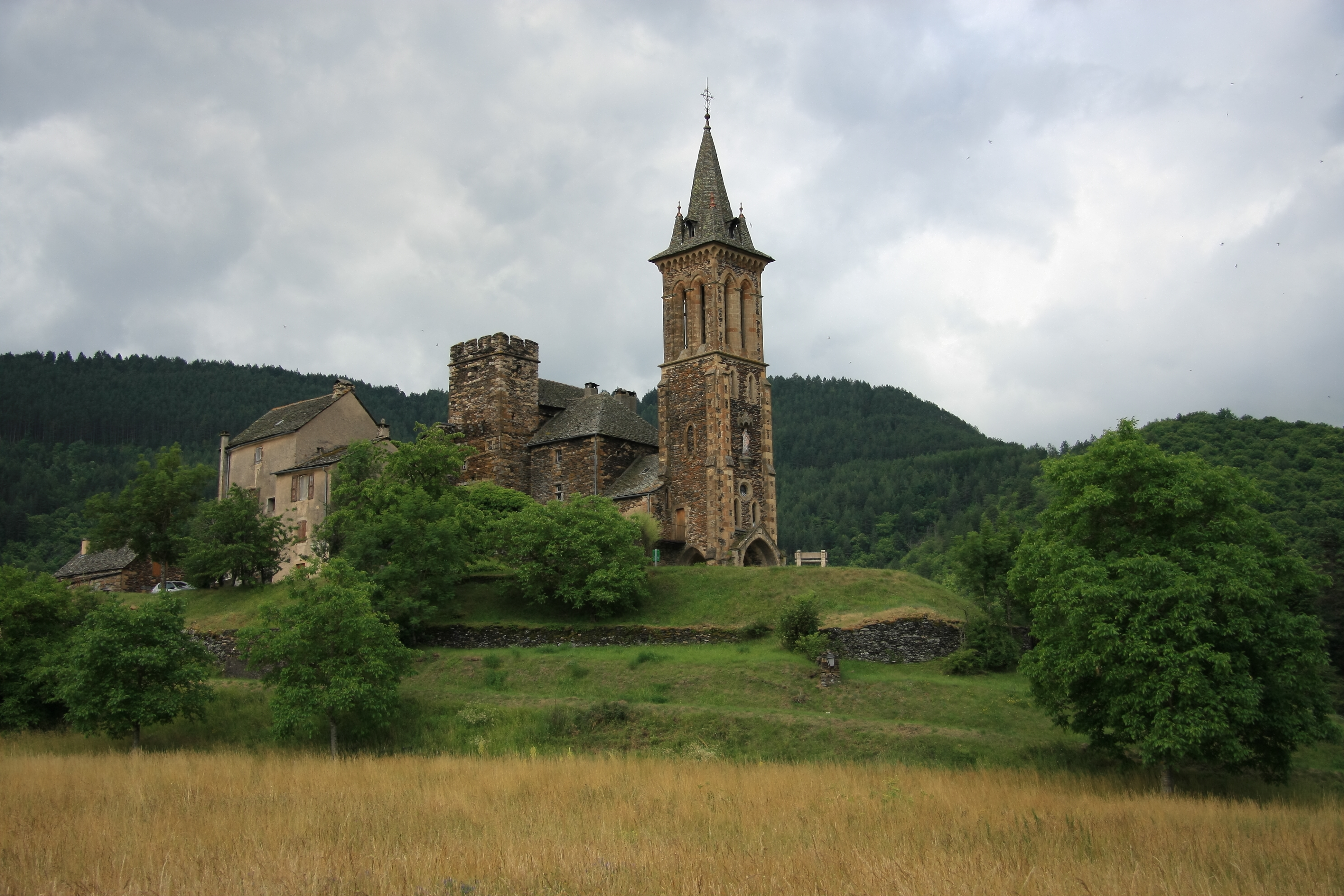 Collégiale de Bédouès en Lozère (France)